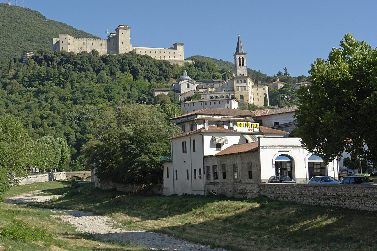 Festung (Gefängnis)